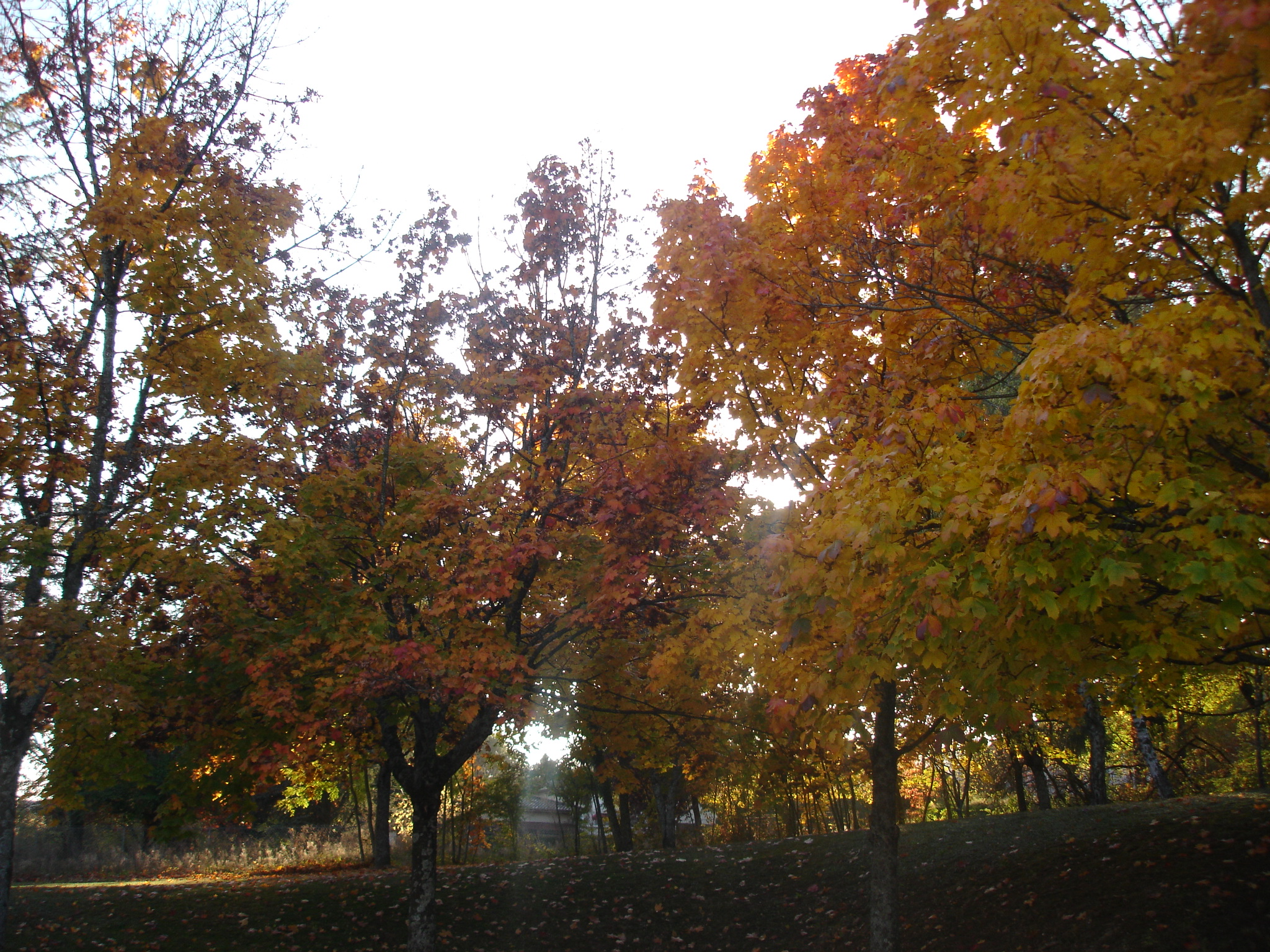 Revermont : Jeux de lumière d'automne dans les arbres